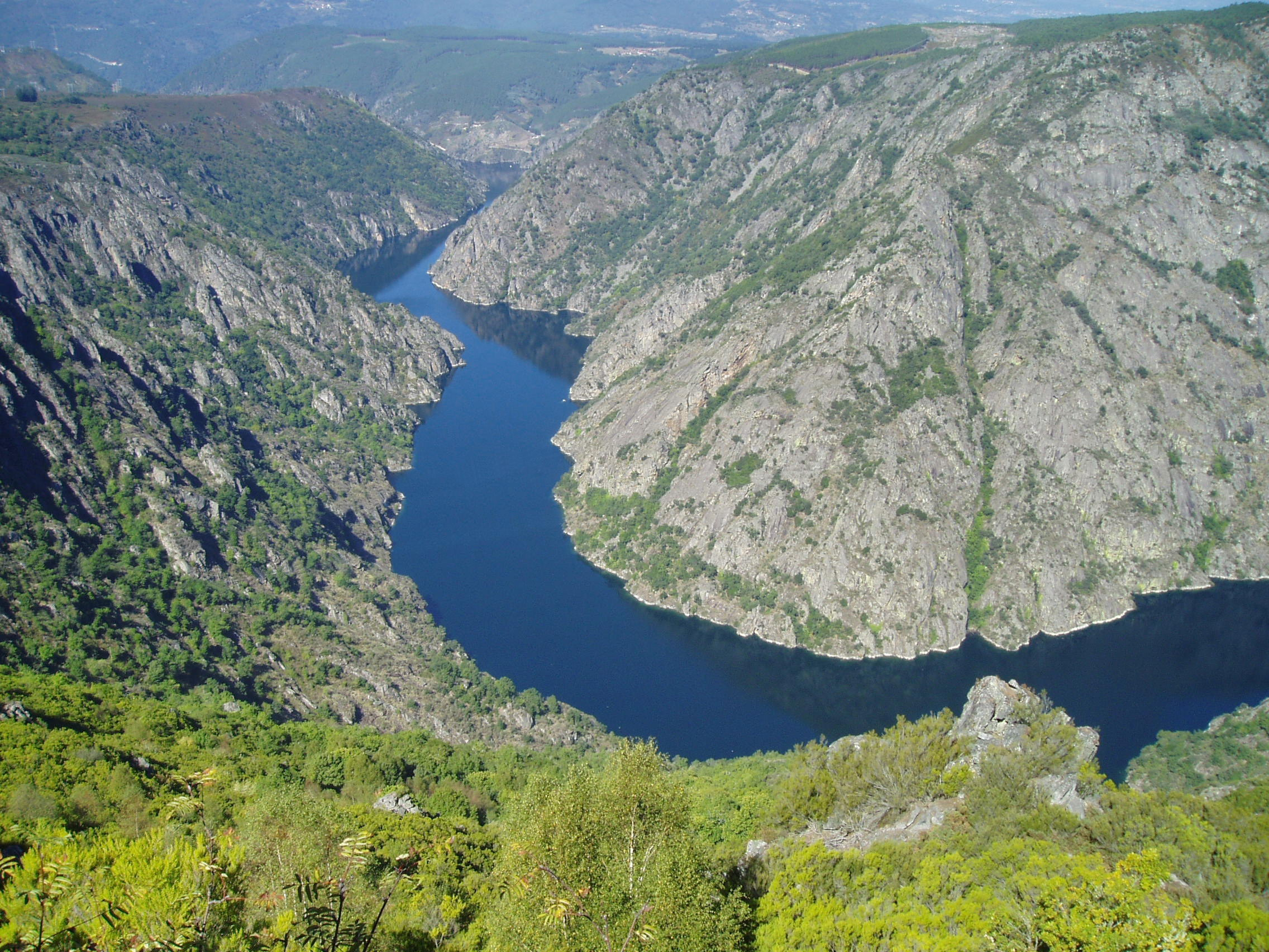 Vista aerea do canón do Sil. Unha banda do río pertence á provincia de Ourense a outra á de Lugo (concello de Sober). Foto traballada. Eliminados os cables. Potenciados algúns verdes para mellorar contraste. edistribuída a luz. Imaxe dende enriba dos canons do Sil.